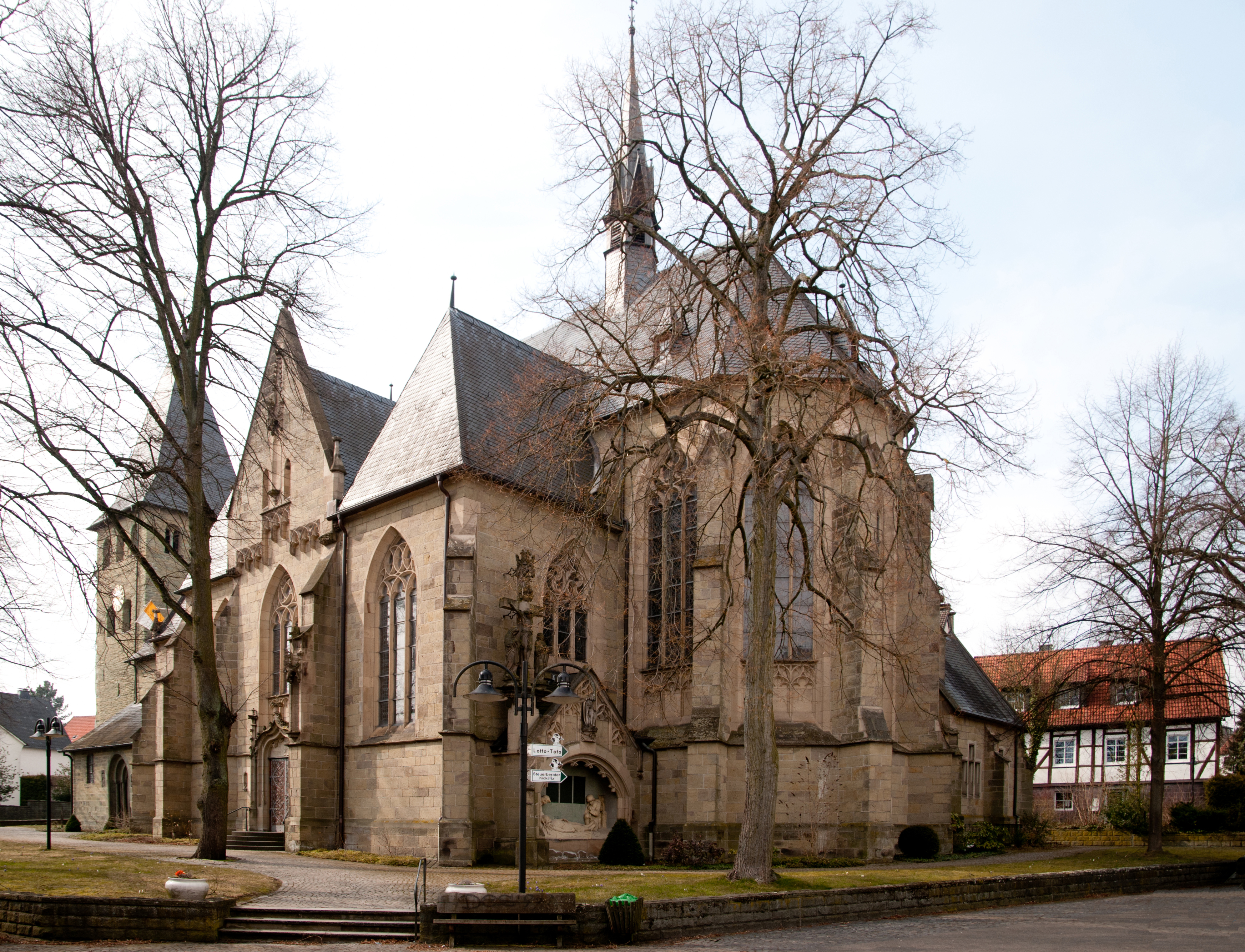 St. Lambertus, Außenansicht